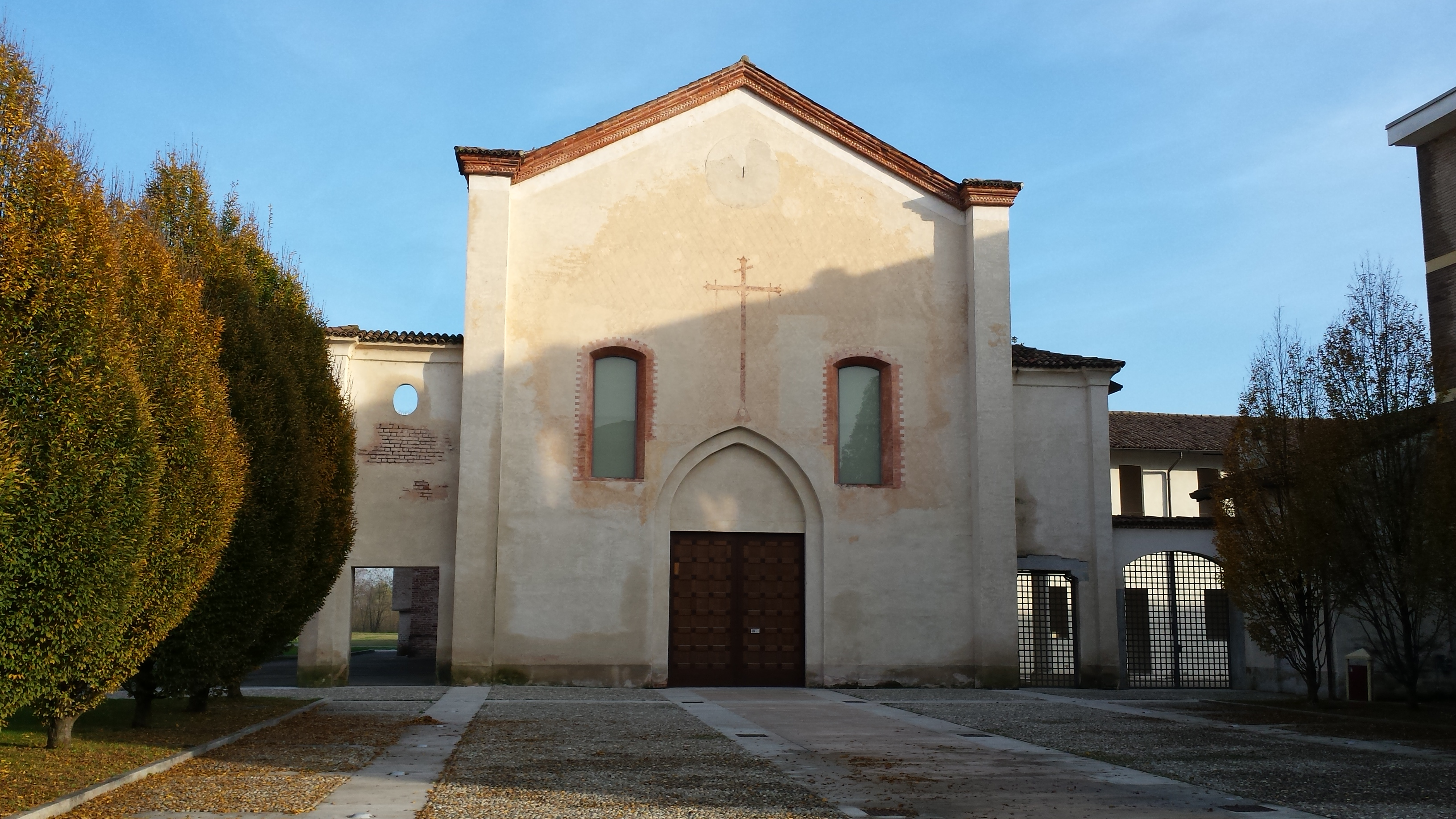 Abbiategrasso - Chiesa ex convento Annunciata - Via Pontida